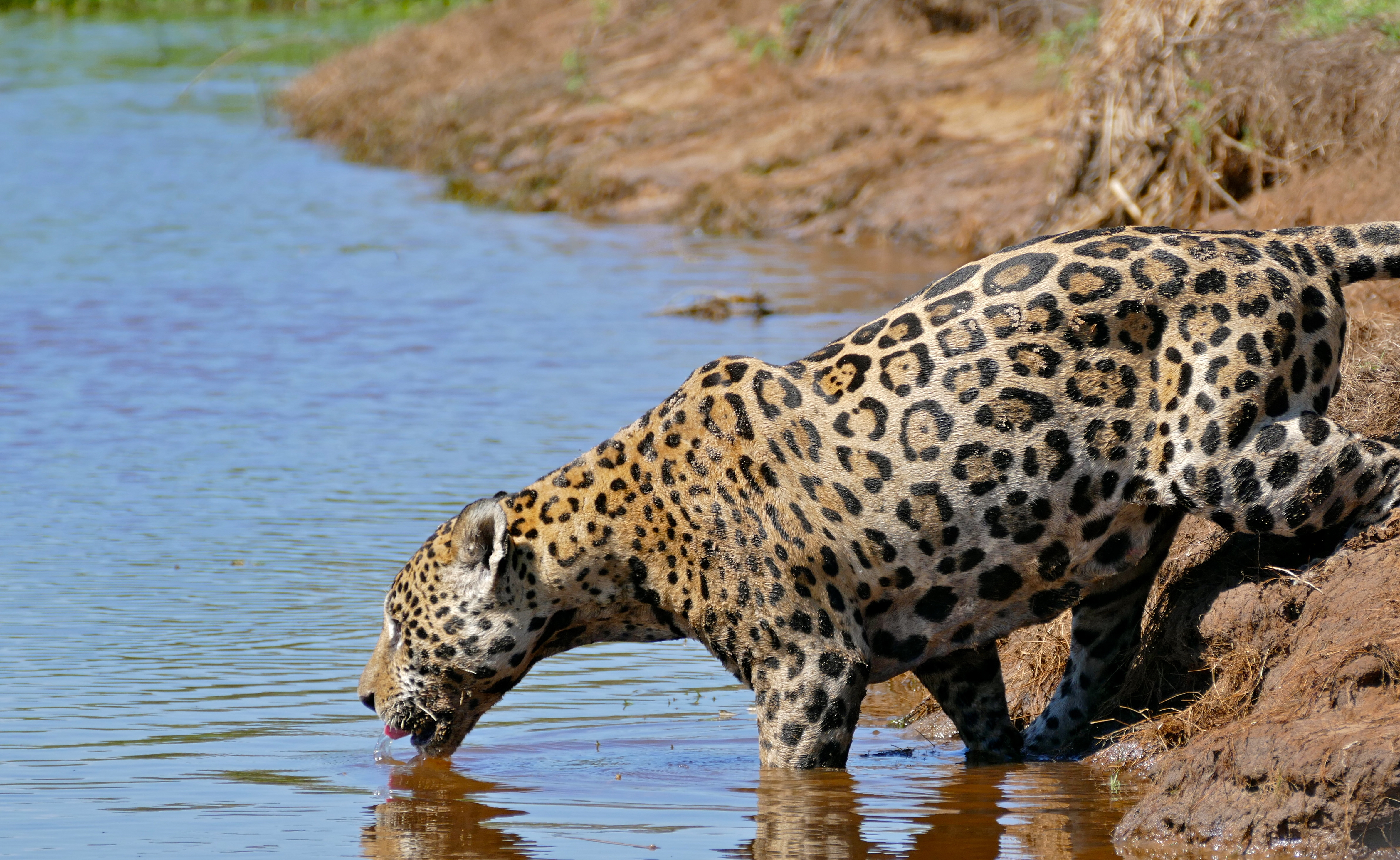 Rio São Lourenço, Porto Jofre, Pantanal, Poconé, Mato Grosso, BRAZIL